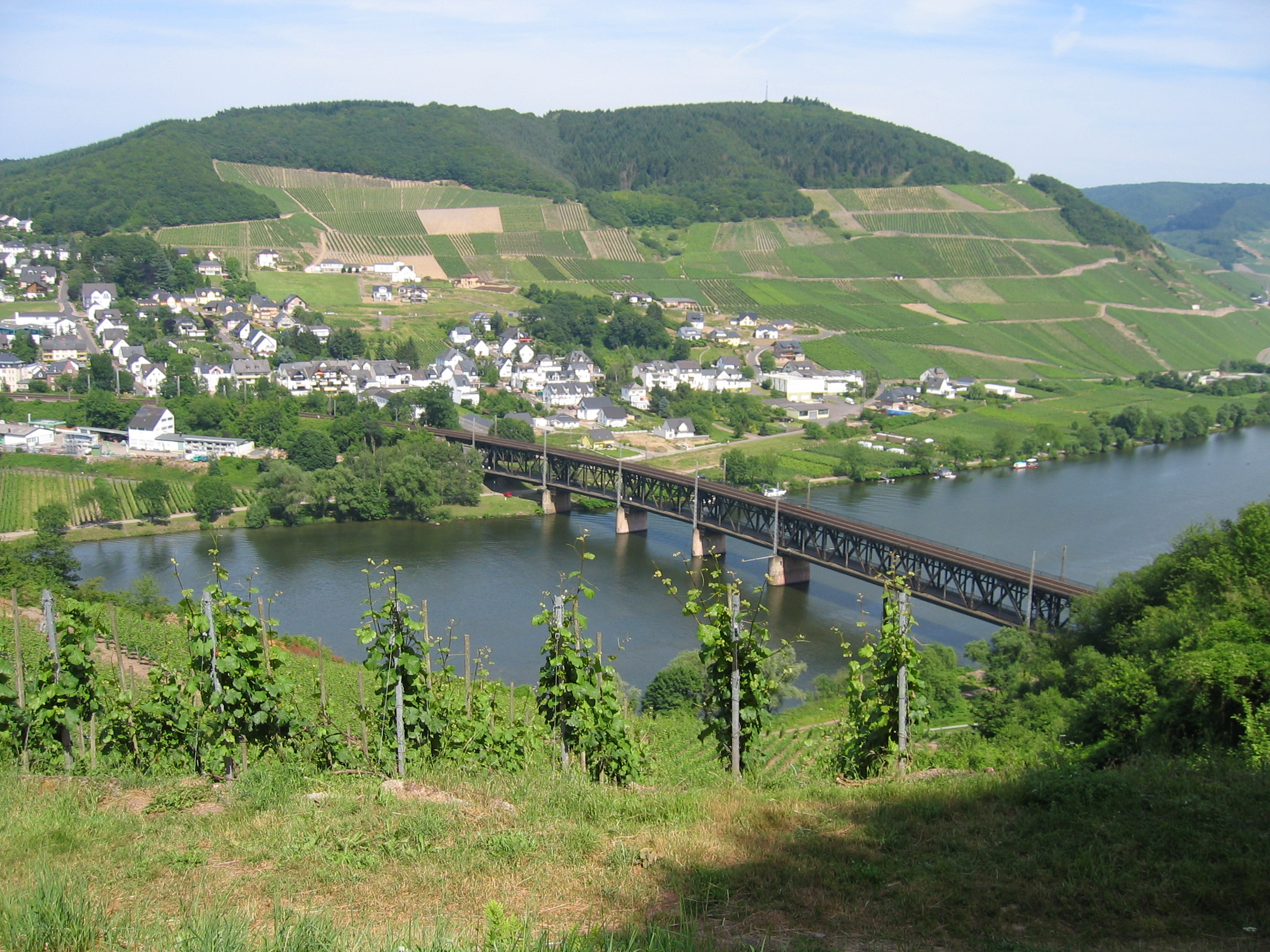 Doppelstockbrücke Alf-Bullay